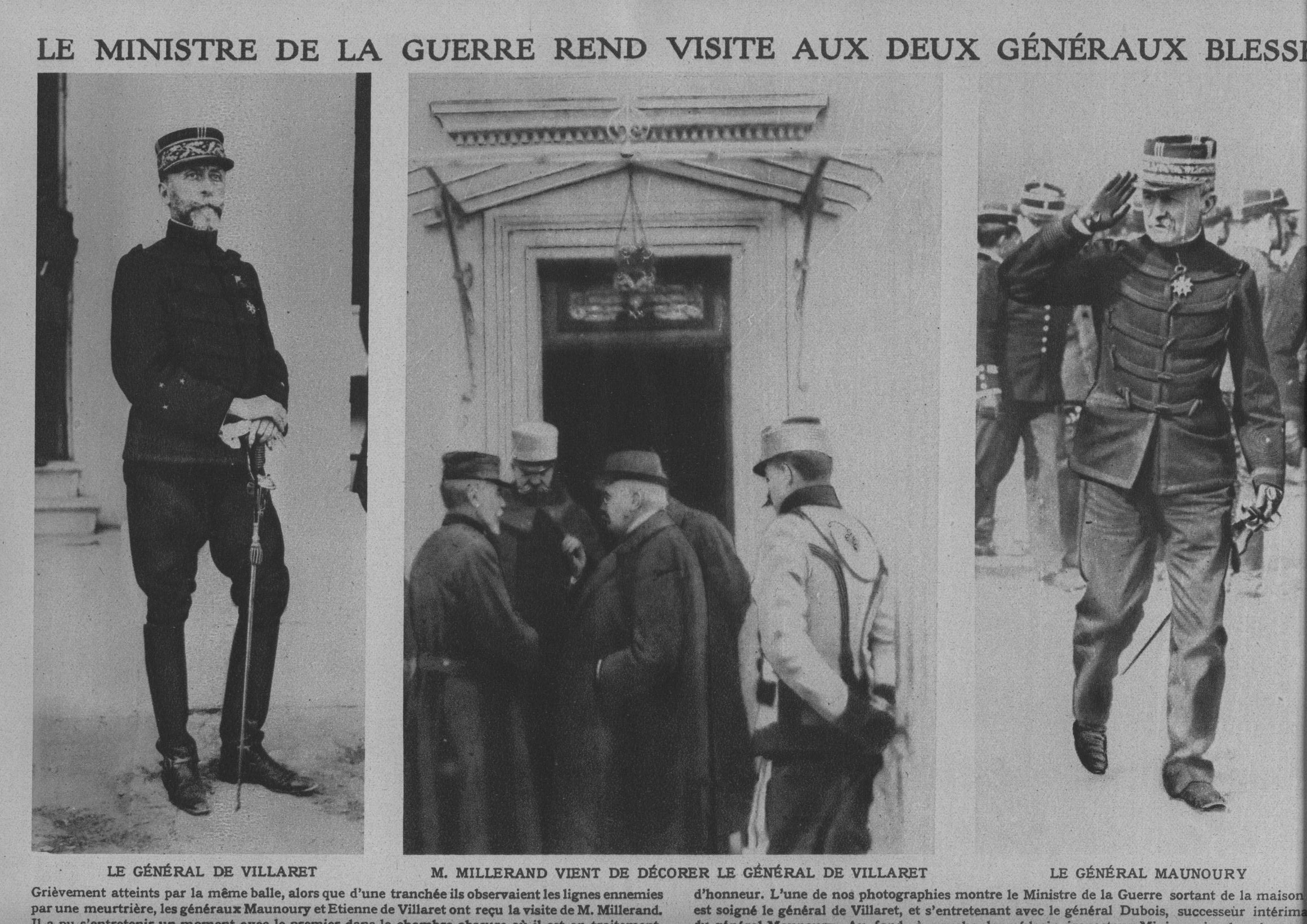 Les généraux français Maunoury et de Villaret revenant de blessure sont décoré par le ministre de la guerre Millerand.